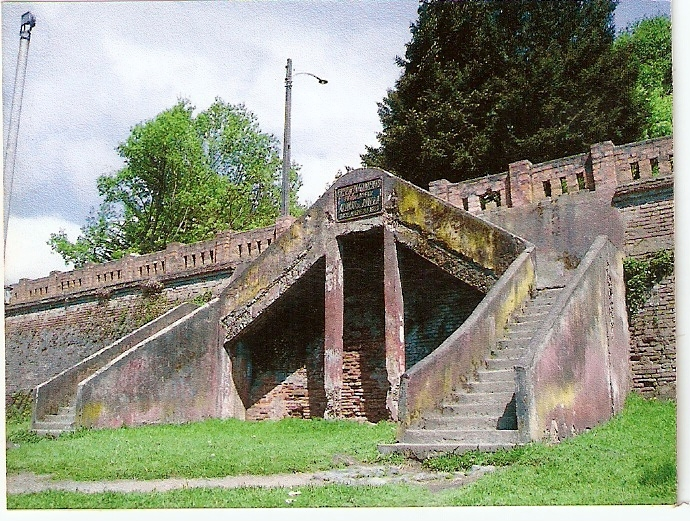 fuerte de nacimiento hasta noviembre del 2008 This is a photo of a national monument in Chile: 147